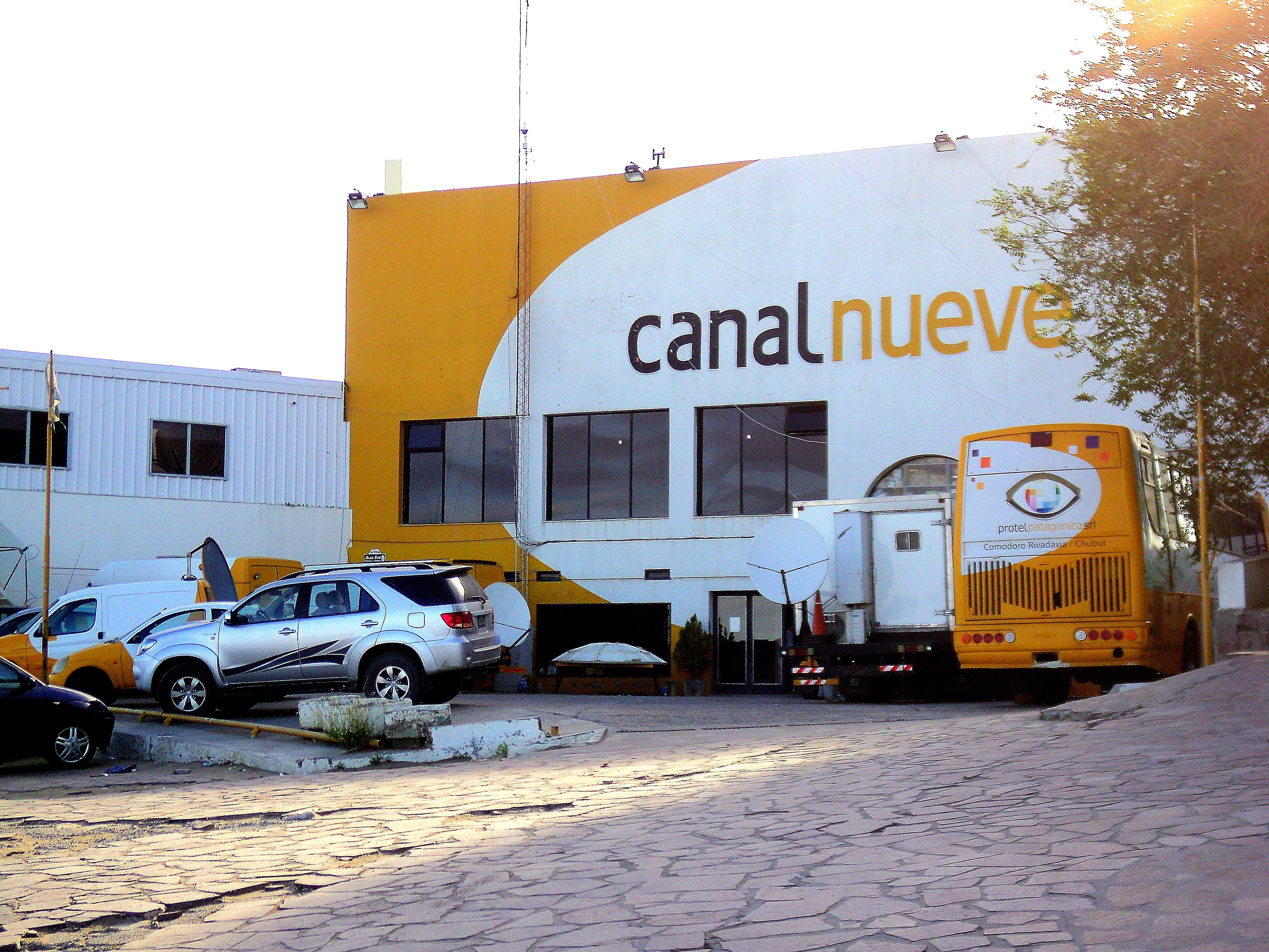 edificio principal de canal 9 sobre la ruta 3